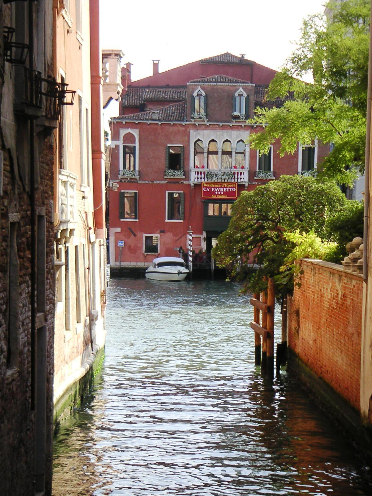 ca favretto vu du rio de san felice venise